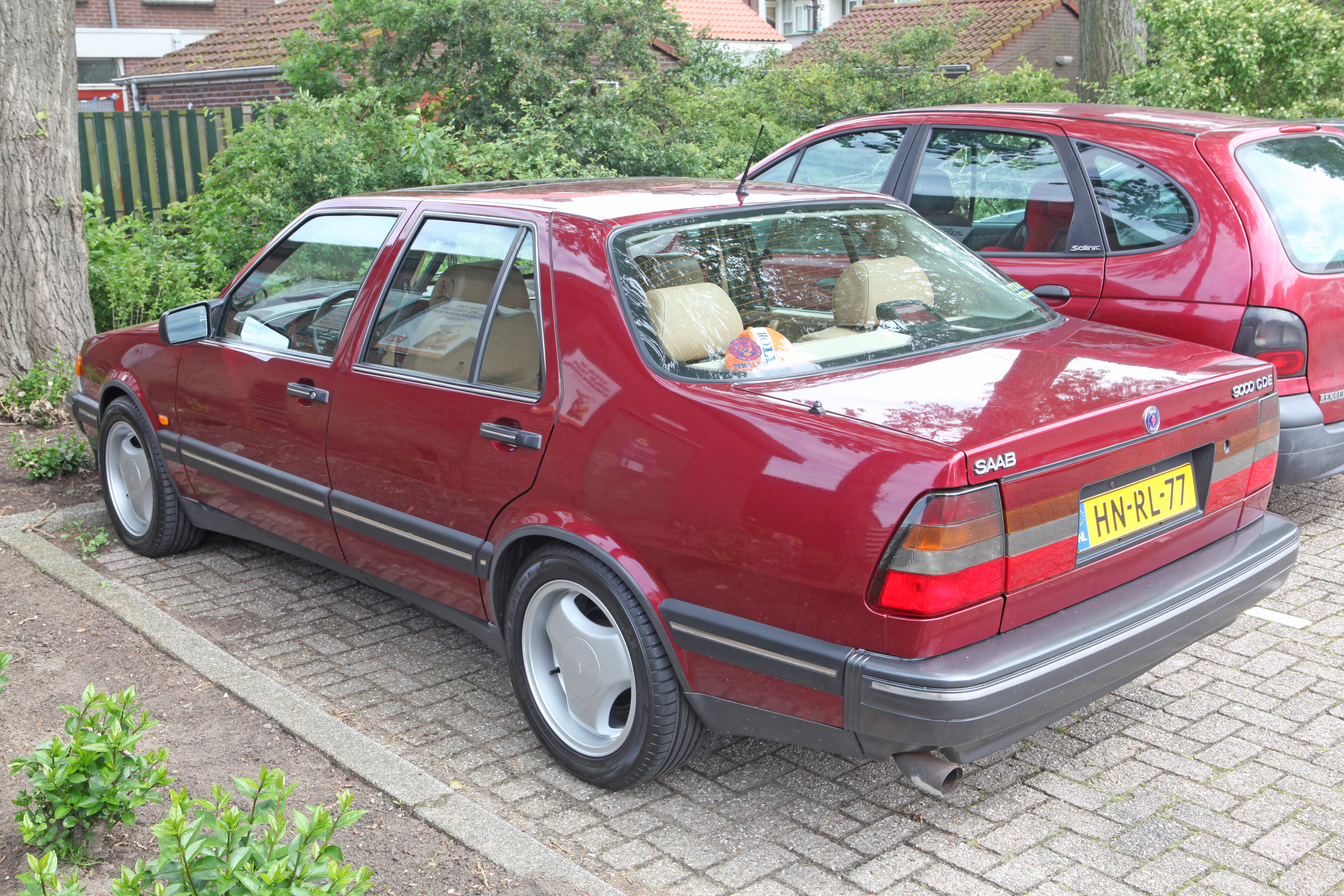 1993 Saab 9000 CDE